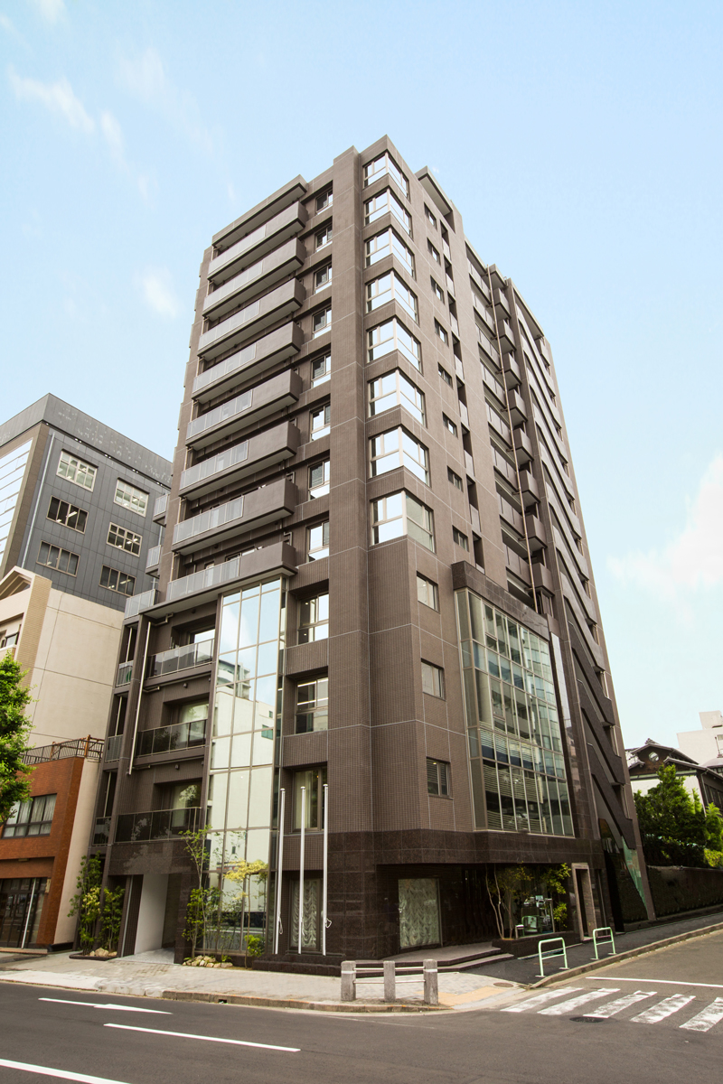 AREX丸の内本社(2015年7月撮影)